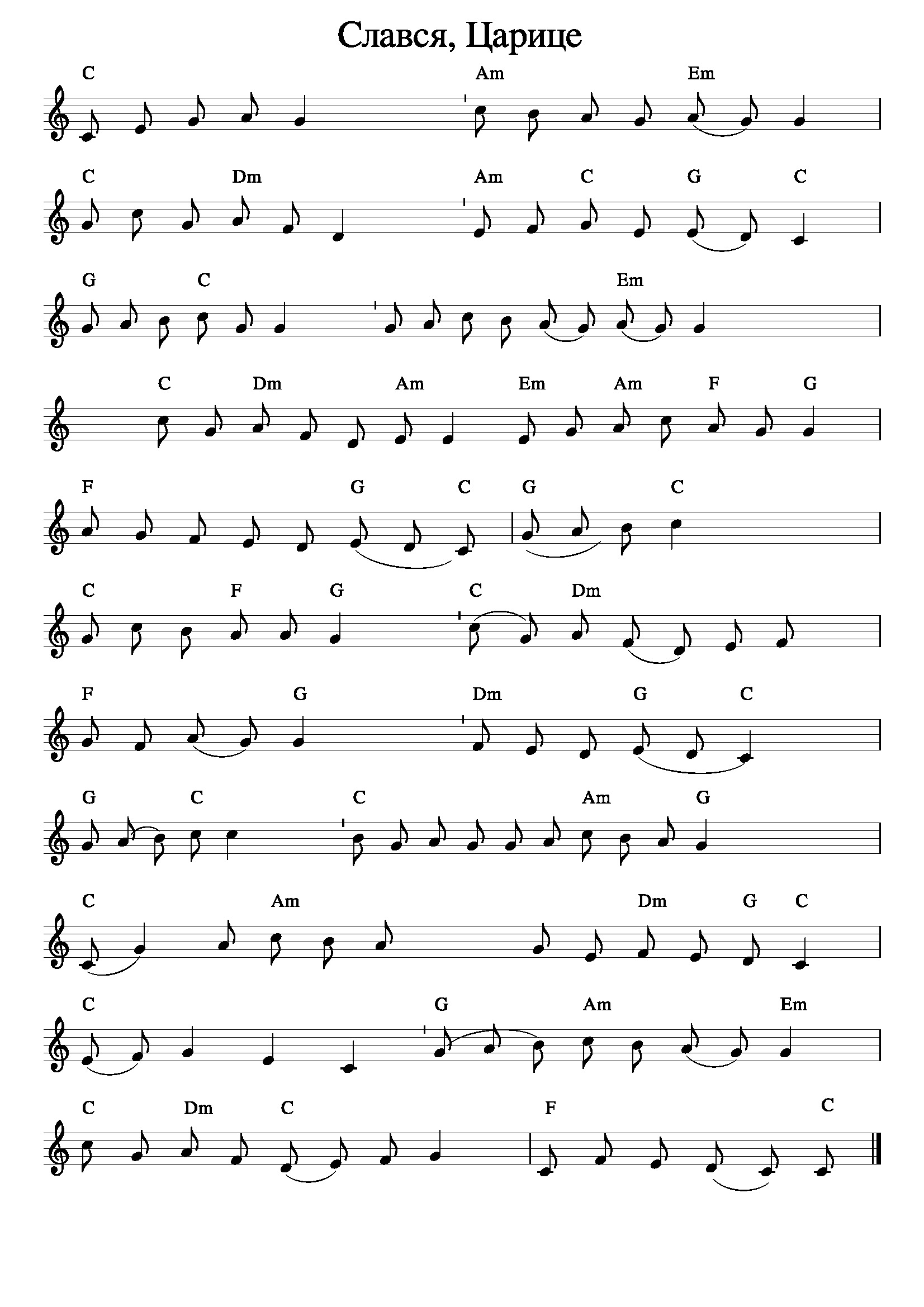 Нотний запис